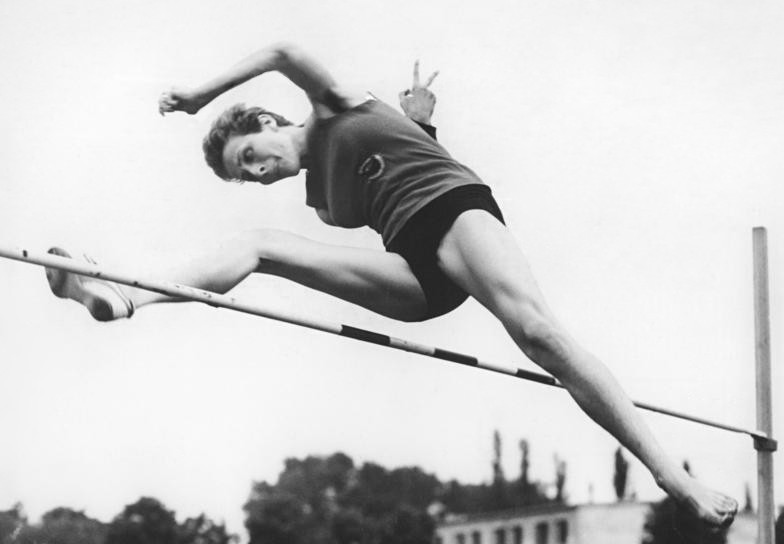 Doris Walther Zentralbild Wendorf 1.10.1962 XIII. Deutsche Leichtathletik-Meisterschaften 1962. Vom 28. bis 30.09.1962 wurden im Dresdner Heinz-Steyer-Stadion die XIII. Deutsche Leichtathletik-Meisterschaften 1962 ausgetragen. UBz: Doris Walther (So Lok Leipzig) sprang mit 1,71 m einen neuen deutschen Hochsprungrekord und wurde damit gleichzeitig Deutsche Meisterin. (Doris Waither hier bei einem 1.63 m Sprung in Potsdam) .